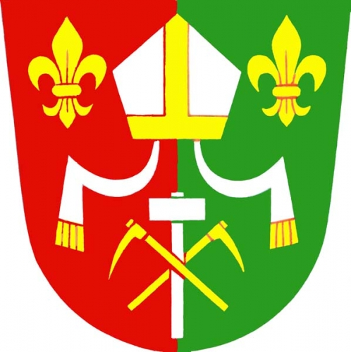 Znak, Maletín, okres Šumperk